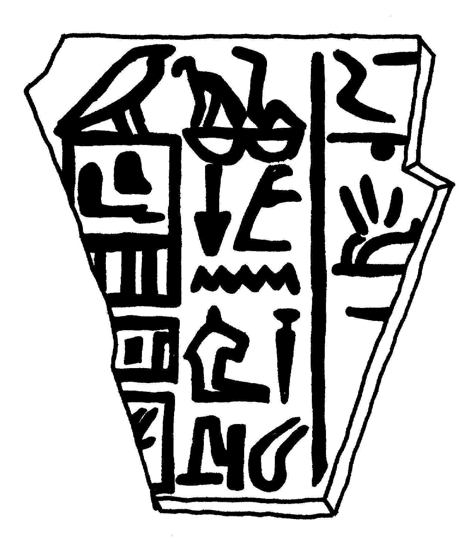 Elfenbeinetikett des Königs Qaa